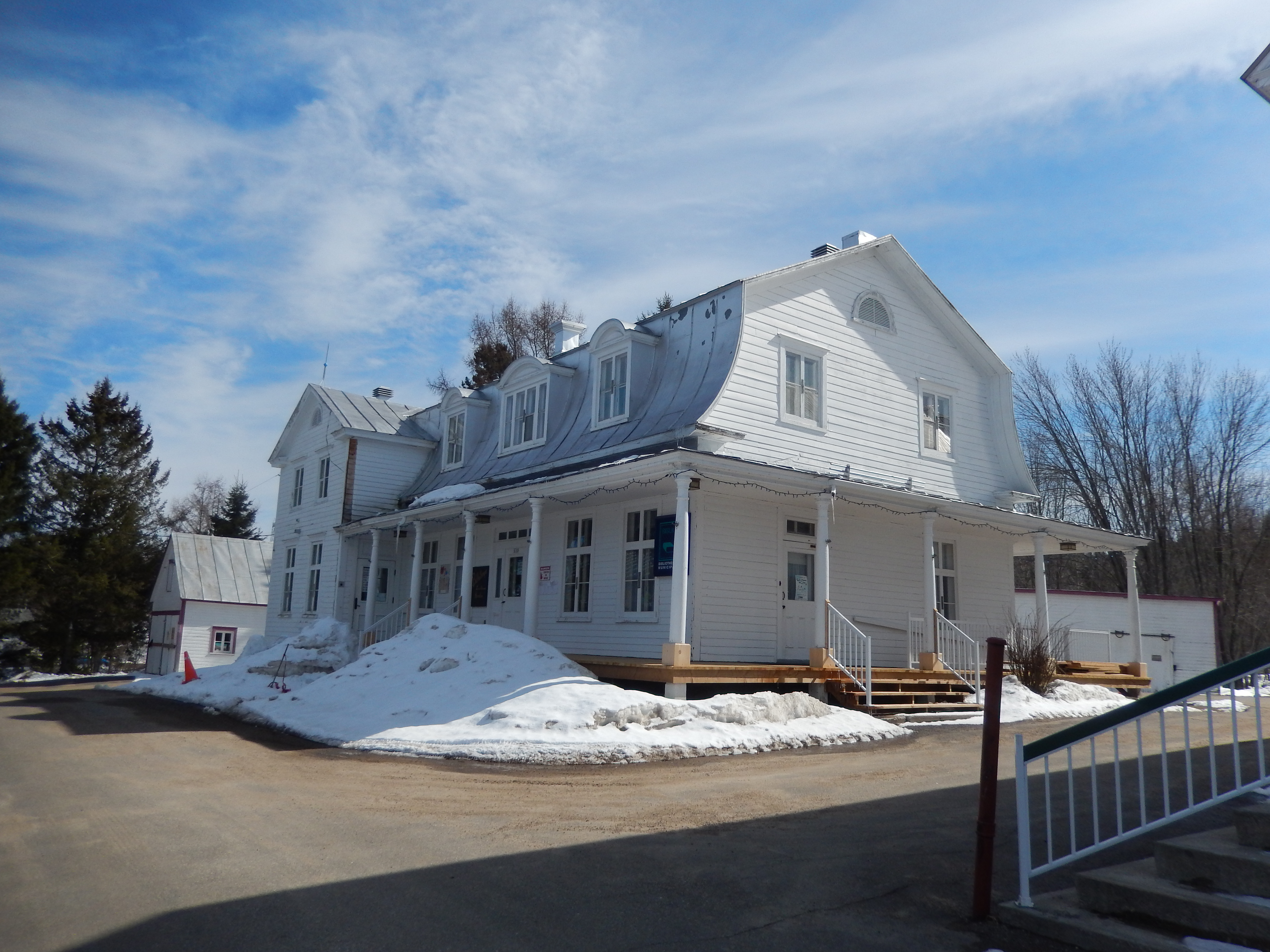 Bureau municipal de Saint-Didace, avril 2016